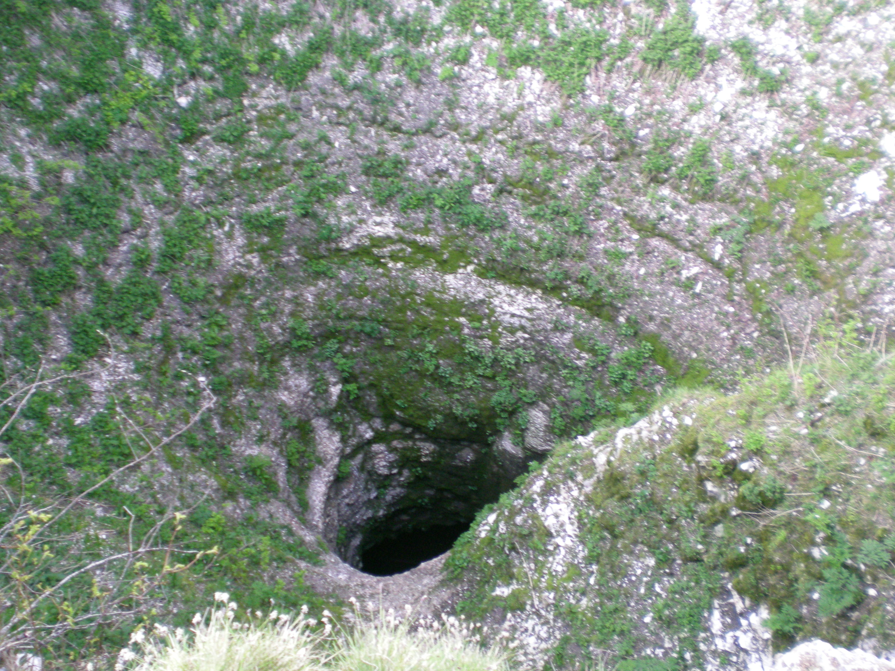 L'ingresso della Spluga della Preta